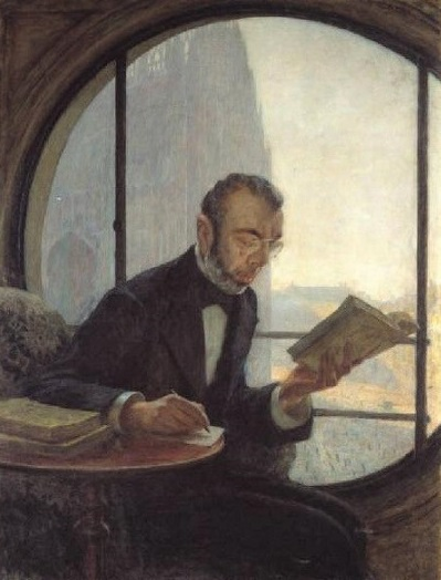 Ritratto di Felice Cameroni, olio su tela, 100 x 130,5 cm, Raccolte d'Arte dell'Ospedale Maggiore di Milano